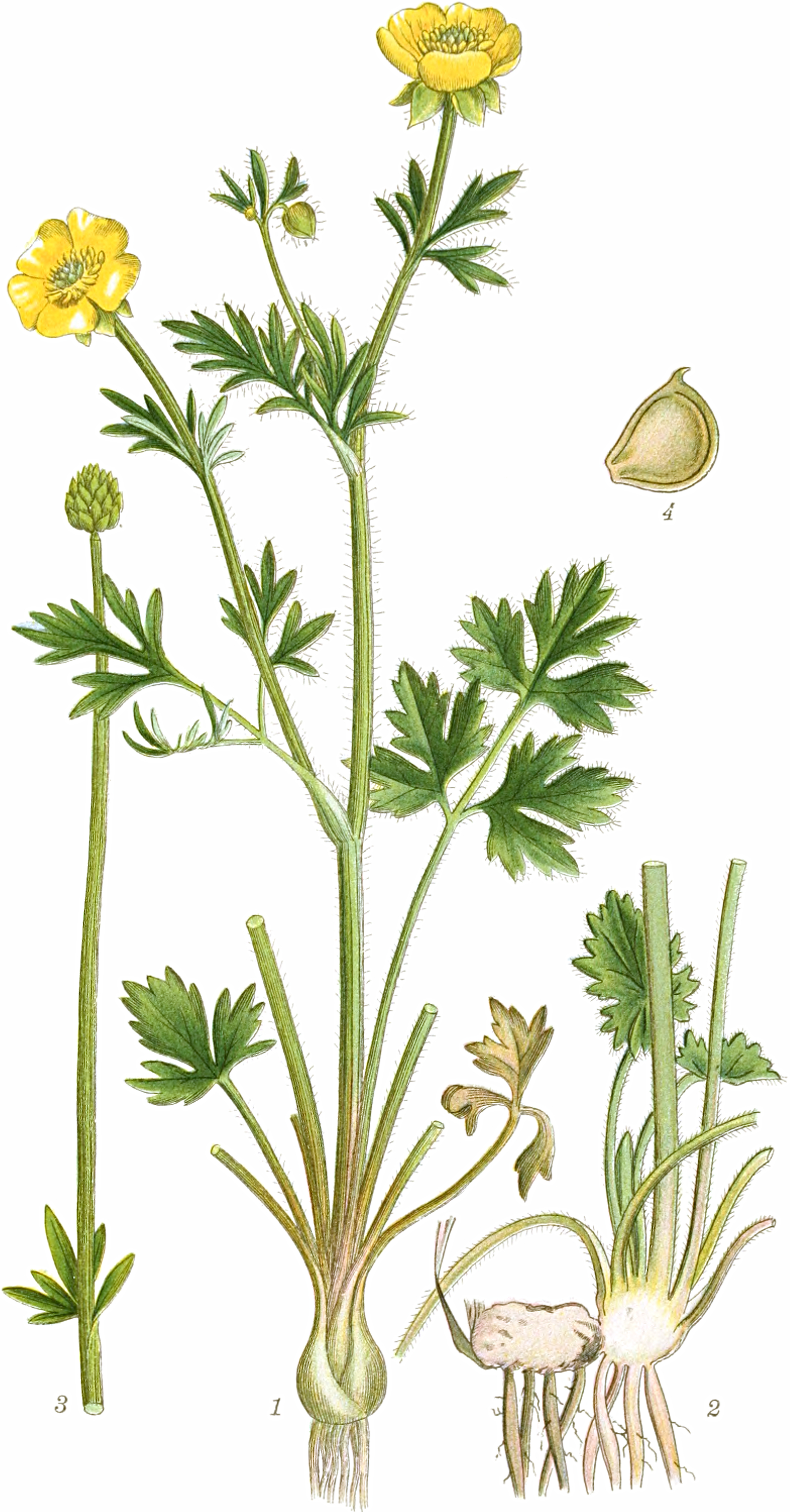 Mentz, A.; Ostenfeld, C. H.: Bilder der Nordflora. Band 1, 1917ff.Knolliger Hahnenfuß. Ranunculus bulbosusTaf. 161. Abb. 1. Blühende Pflanze. Abb. 2. Längsschnitte einer alten und einer jungen Knolle mit abgeschnittenen Blättern und Stängel. Abb. 3. Stängel mit junger Frucht. Abb. 4. Früchtchen (5/1).